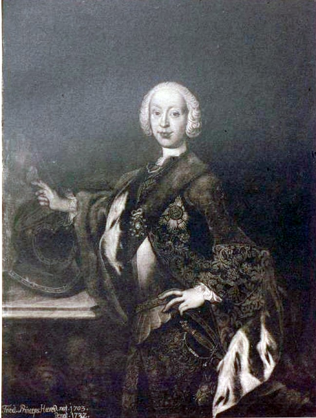 Friedrich von Baden-Durlach (1703-1732), der Vater von Grossherzog Karl Friedrich